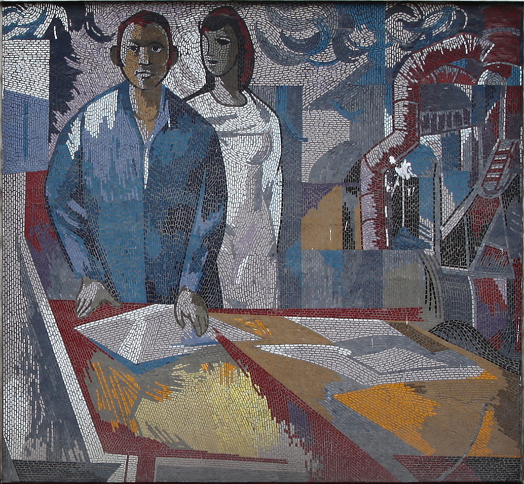 Teil des Mosaik von Fritz Eisel am ehemaligen Datenverarbeitungszentrum (DDR) in Potsdam.